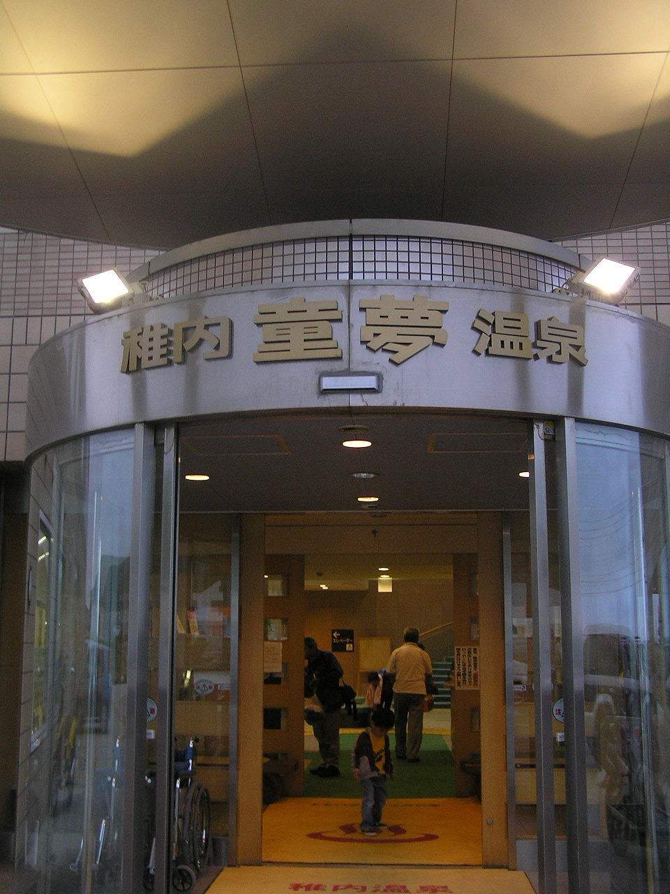 童夢温泉 稚内